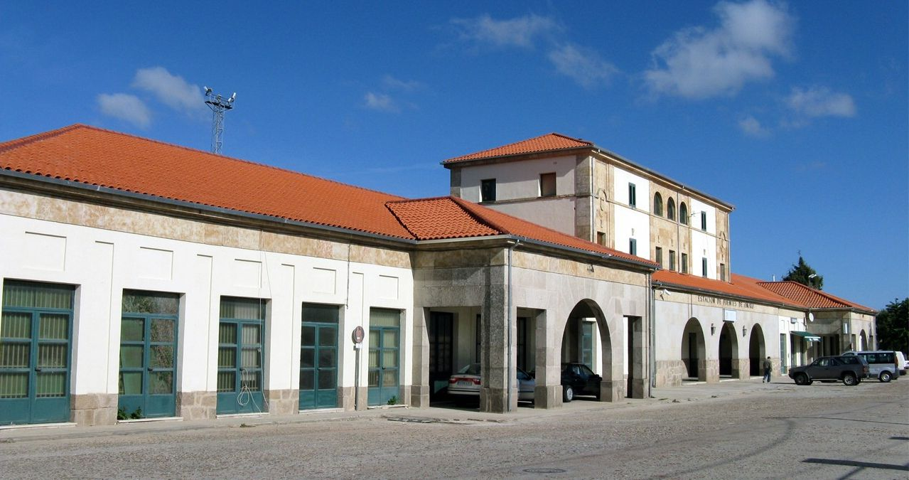 Estação de Fuentes de Oñoro em Espanha, que faz ligação à linha da Beira Alta